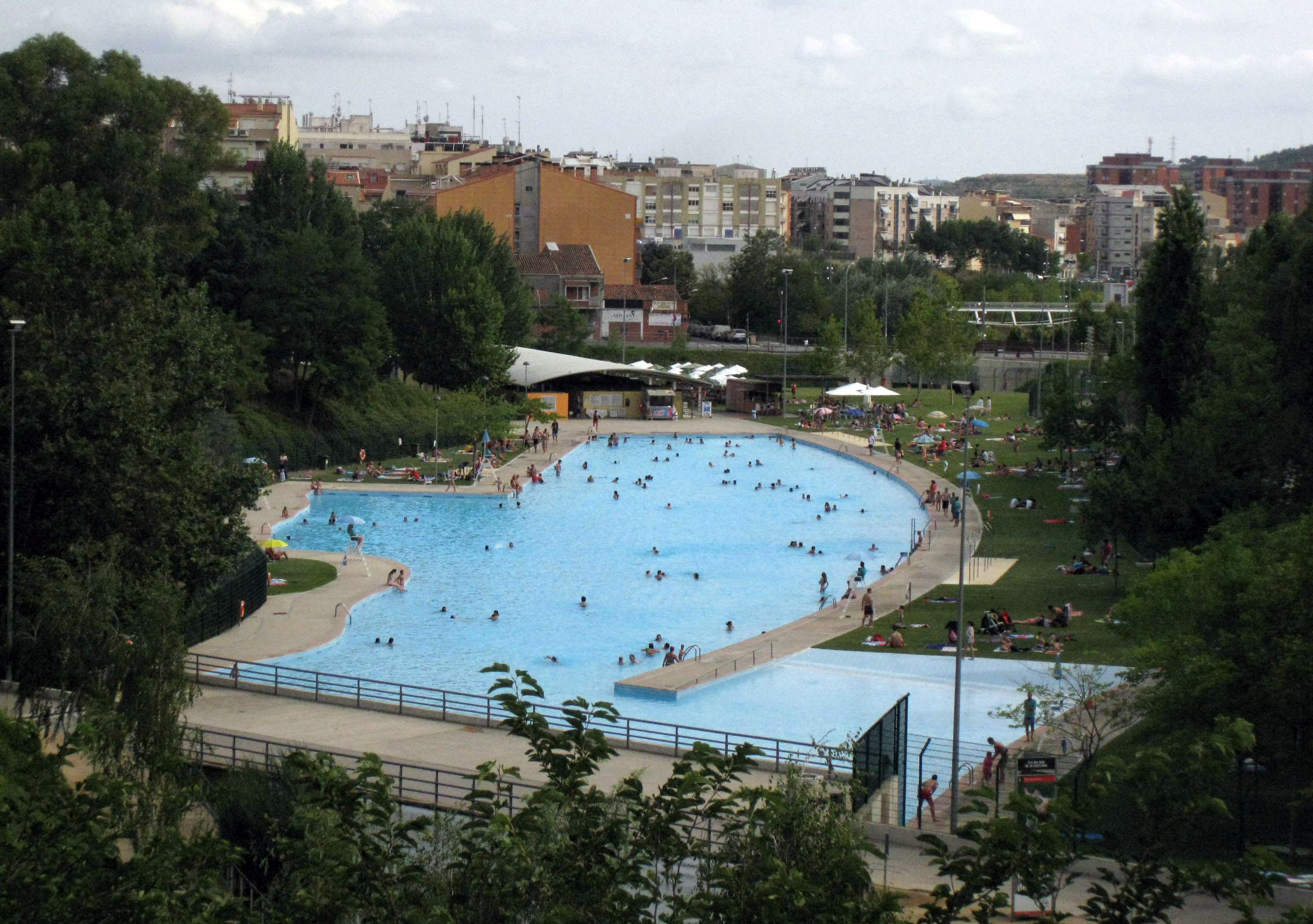 Parc de Vallparadís (Terrassa). Piscina, anomenada el Llac de Vallparadís.